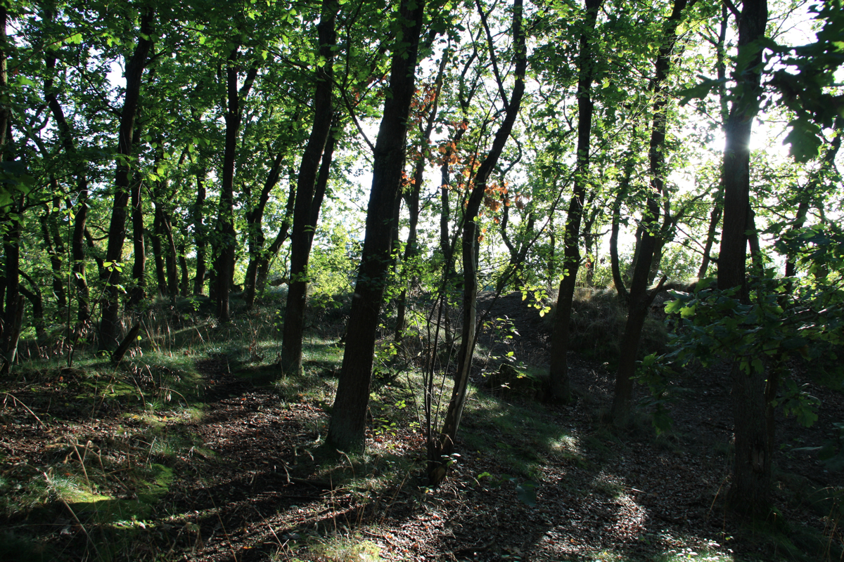 Winterstoven aan de Kruisberg